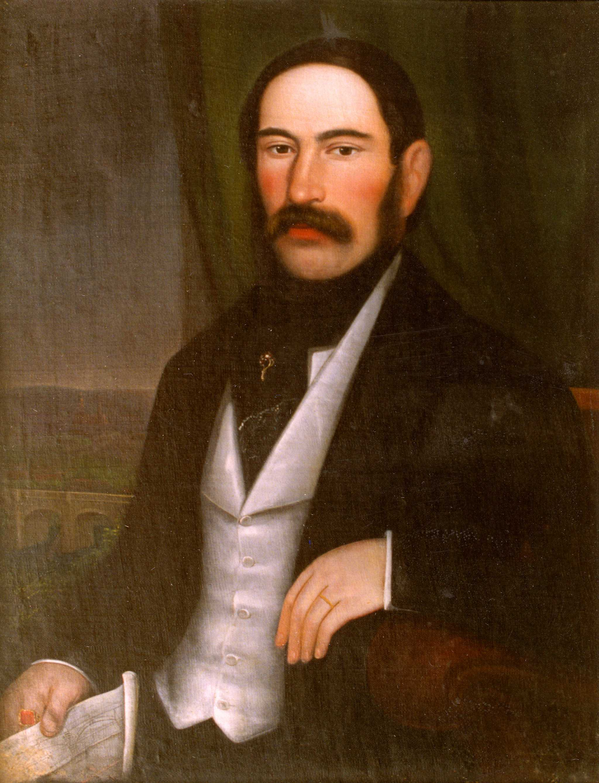 Martin Stelzer (1815 - 1894), Český stavitel.